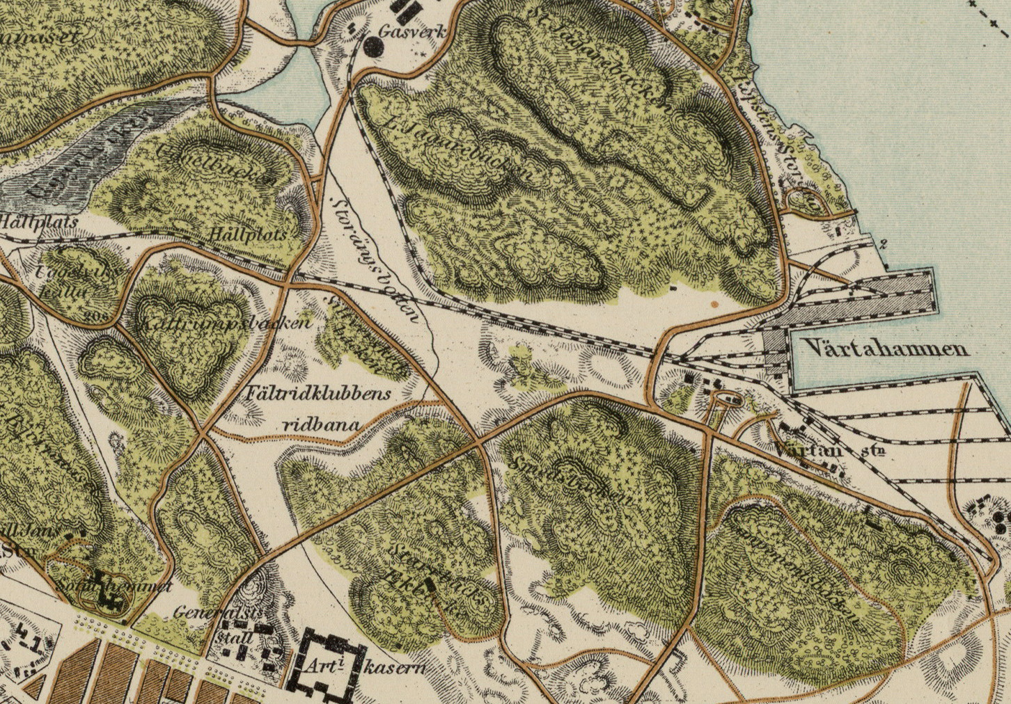 Del av Topografiska Corpsens serie Trakten omkring Stockholm i nio blad. Utgiven 1861 och översedd 1891.